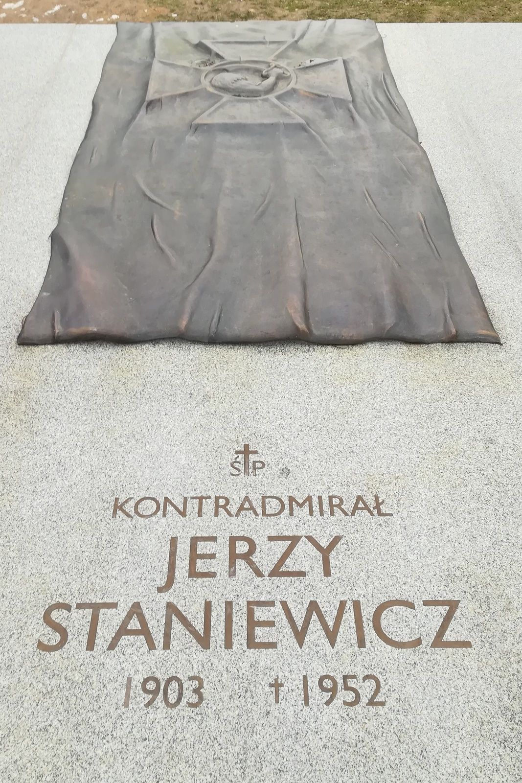 Cmentarz Marynarki Wojennej_Kwatera Pamięci_Kontradmirał_Staniewicz_1